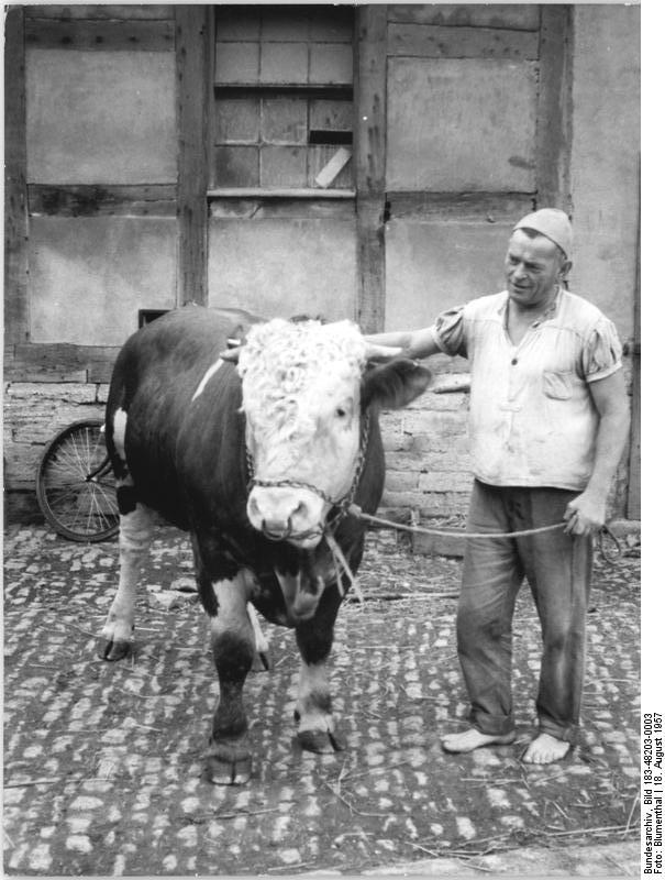 Seebach, Bauer mit Bullen Zentralbild Bez.Red.Erfurt Vo-Schw. 18.8.1957 Blumenthal LPG "7.Oktober" in Seebach bei Mühlhausen ist Republiksieger im 1.Halbjahr 1957 Bereits 1956 wurde der LPG "7.Oktober" in Seebach die Wanderfahne des Rates des Bezirkes zugesprochen. Durch hervorragende Zusammenarbeit der Genossenschaftsbauern und kosequente Einhaltung des Statuts und der inneren Betriebsordnung erhielt er ehemalige Bezirkssieger jetzt die Wanderfahne des Ministerrates, die höchste Auszeichnung, die im Wettbewerb der LPG verliehen wird. UBz: Die Arbeitsgruppe "Rinder", die von Melkermeister Willi Lemme geleitet wird, konnte im 1.Halbjahr 1957 einen Stalldurchschnitt von 2, 250 kg Milch pro Kuh erreichen. Mehrere Kühe haben haben jetzt schon eine Leistung von 4.000 kg Milch aufzuweisen.Bis zum Ende des Jahres will die Arbeitsgruppe eine Milchleistung von 4.300 kg pro Kuh, da sind 1.300 kg je Hektar , erreichen. Melkermeister Willi Lemme mit dem elf Zentner schweren einjährigen Zuchtbullen "Sepp"."